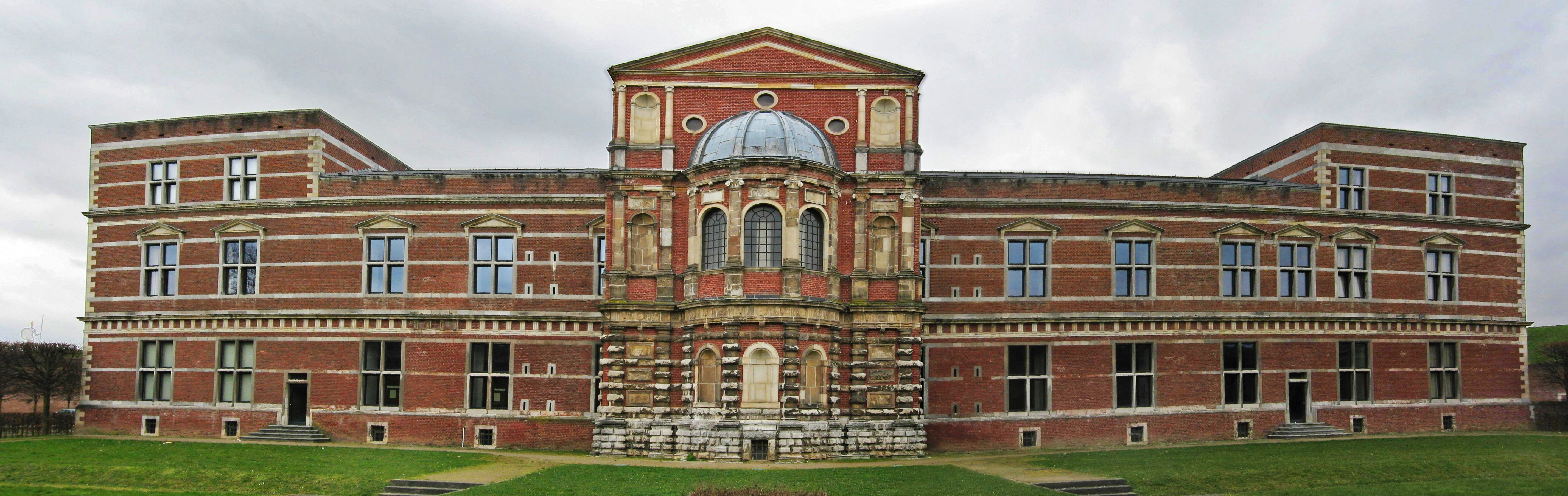 Schloss in Jülich